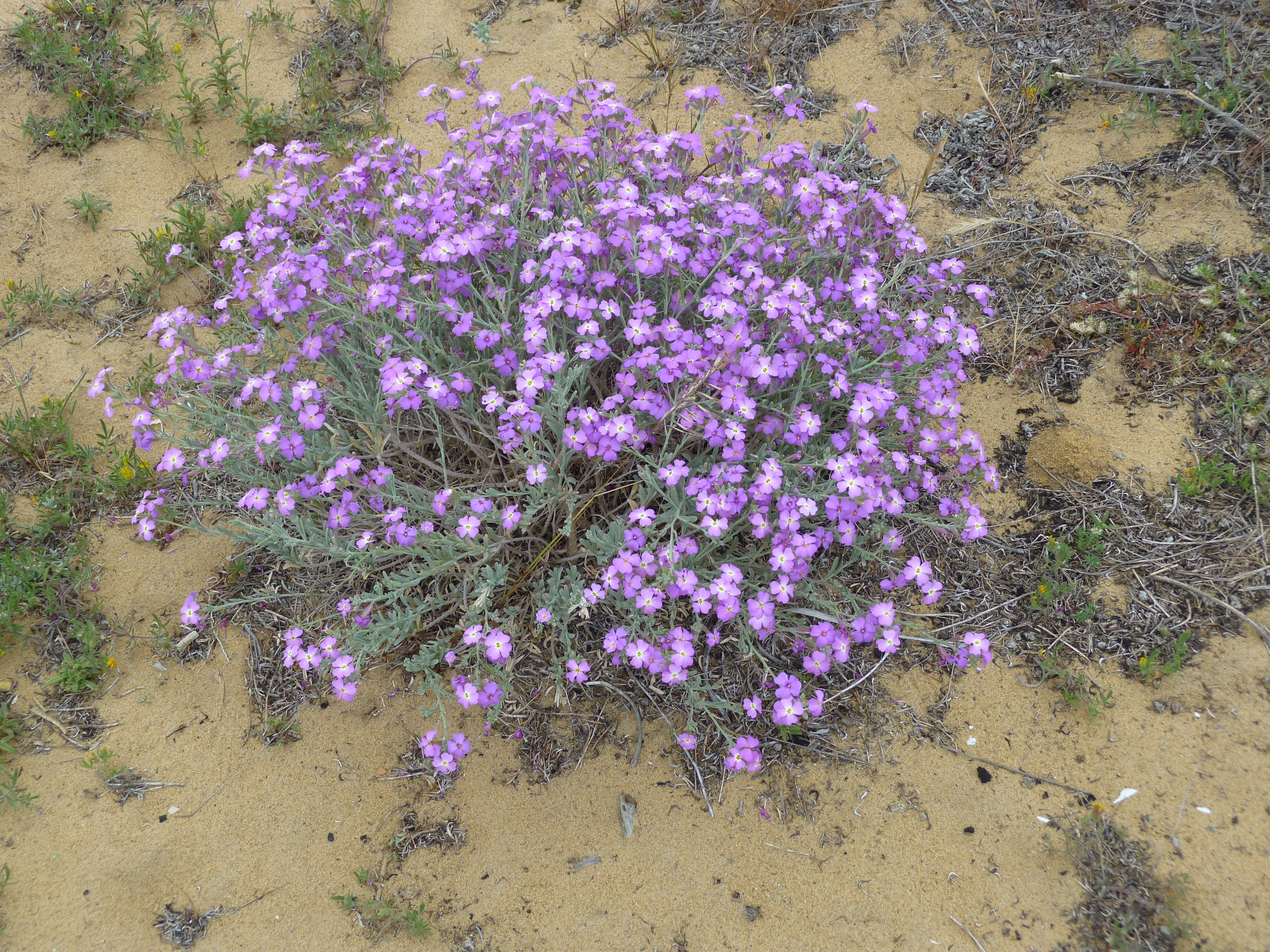 Malcolmia Littorea im Nationalpark Coto de Doñana